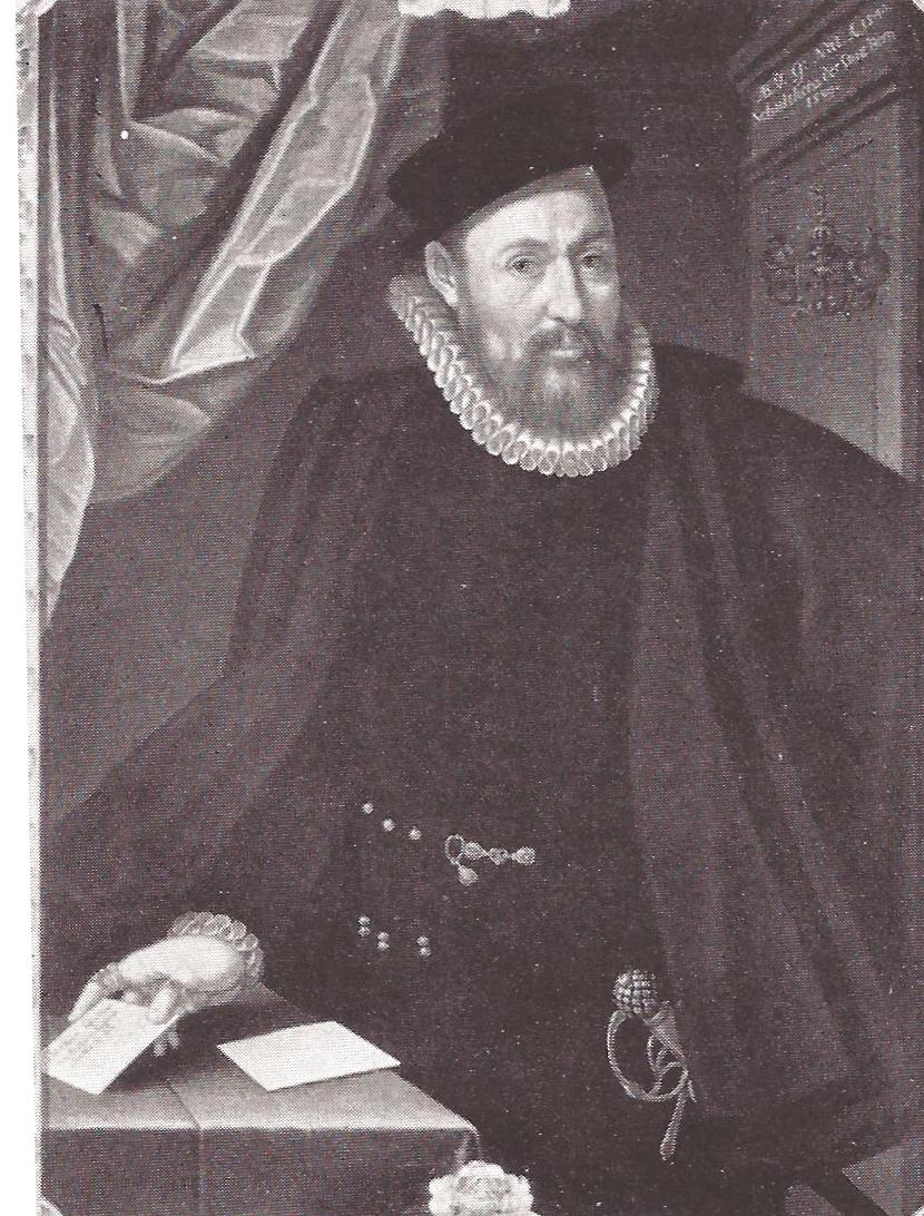 Abraham von Graffenried, Burgerbibliothek Bern, Neg. Nr. 6849.